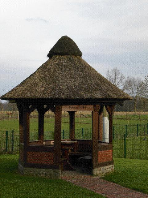 Dreschturm in Hogenbögen, 1994 zur 1175-Jahrfeier von Visbek erbaut.